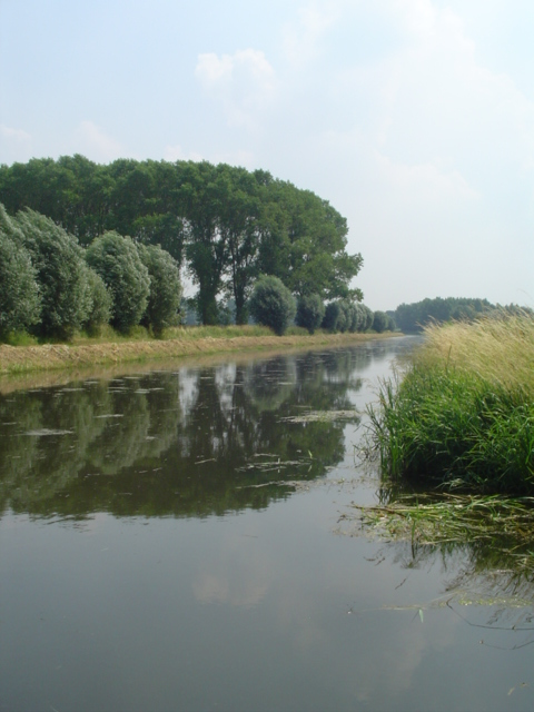 Eigen werk